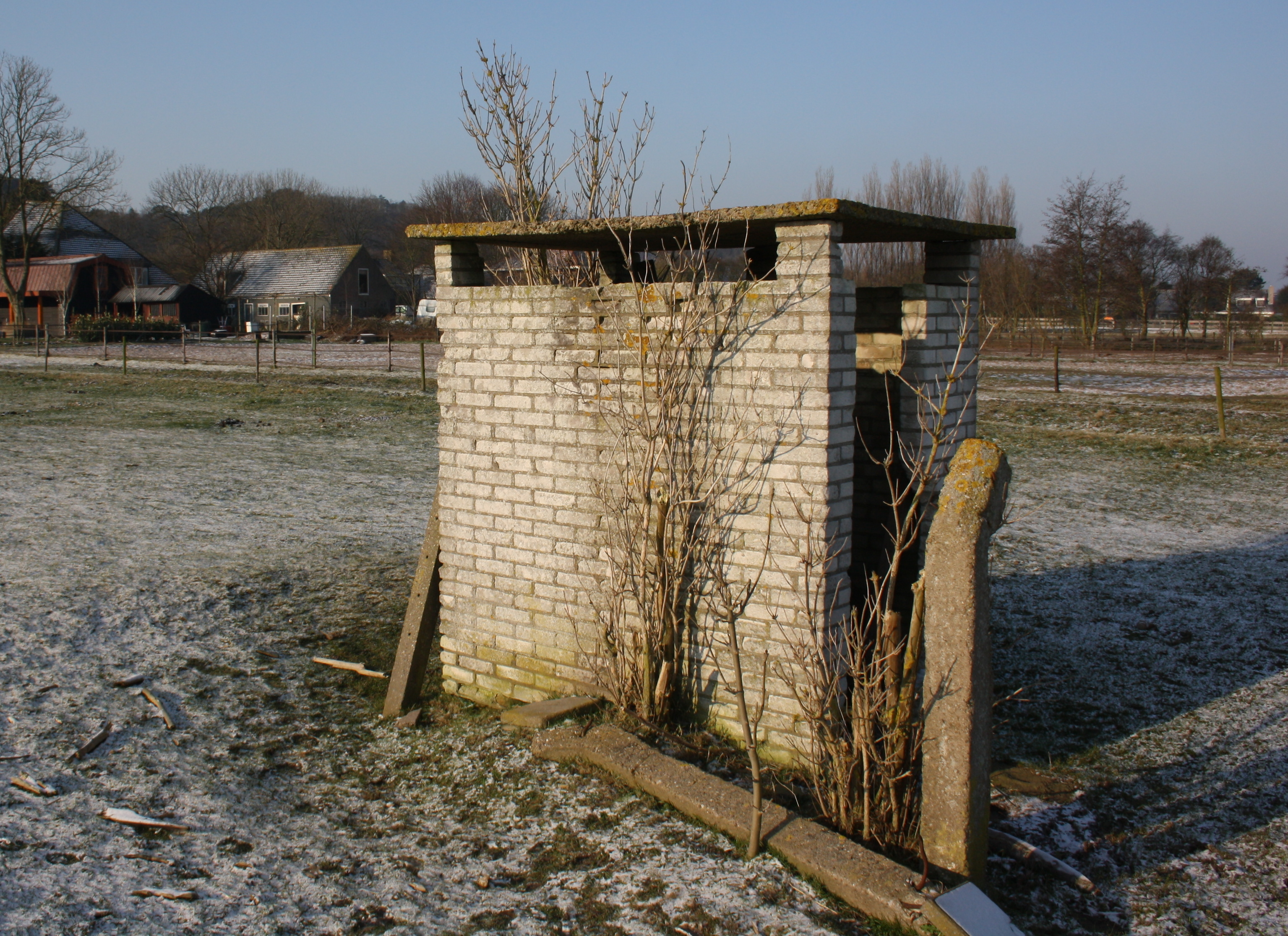 In 1960 werd een waterplaats voor de voetballers van Duinranders opgetrokken. Het was het eerste bouwwerk van de vereniging.